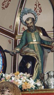 Figura religiosa